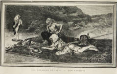 Ilustració Catalana, primera època, número 015 Data: 30 de Novembre de 1880 pàg. 120